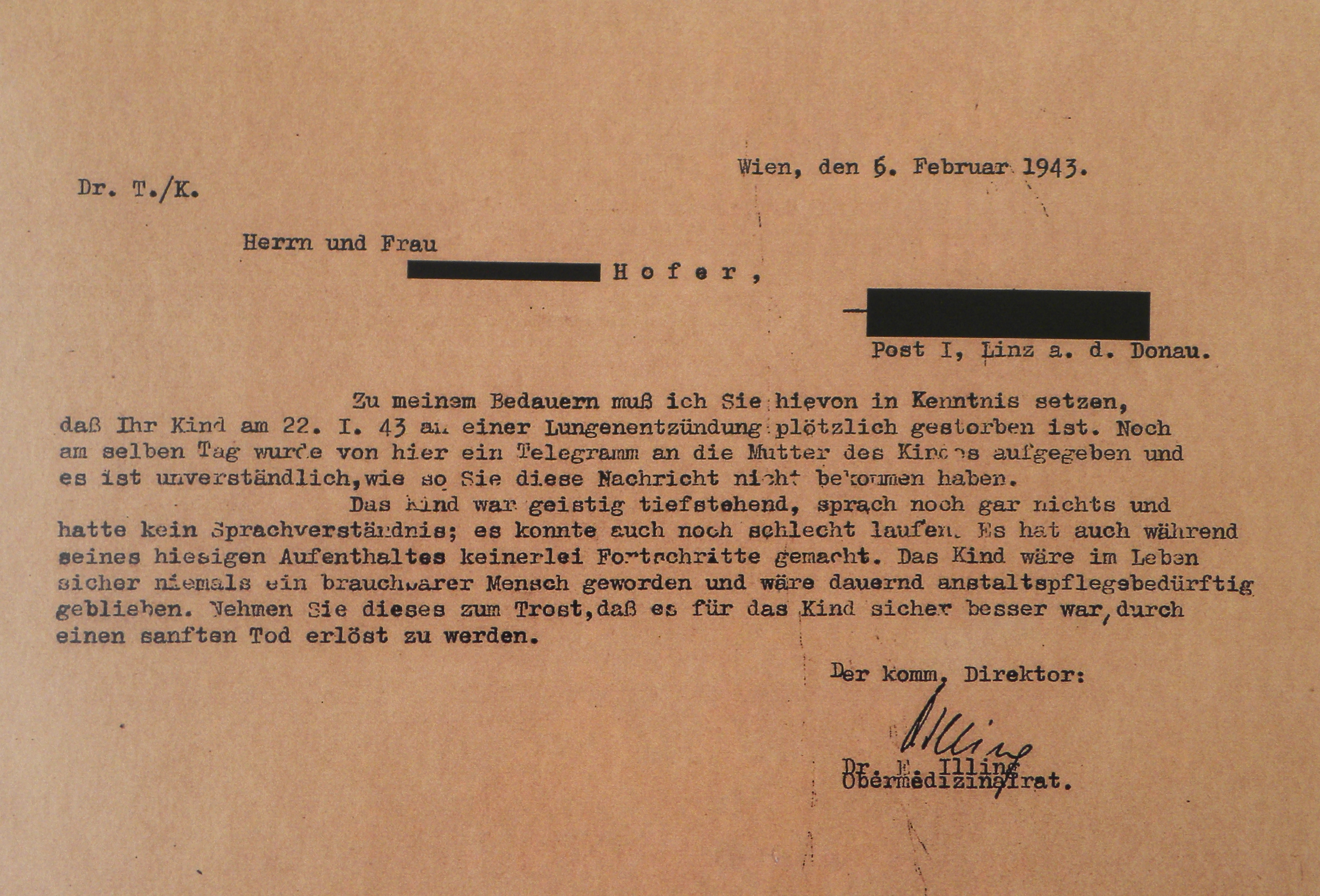 Dieser von Ernst Illing verfasste Brief an die Eltern eines in der sog. Kinderfachabteilung Am Spiegelgrund ermordeten Kindes ist Teil der Ausstellung "Der Krieg gegen die Minderwertigen" des Österreichischen Dokumentationsarchivs im V-Gebäude des Otto-Wagner-Spitals in Wien.